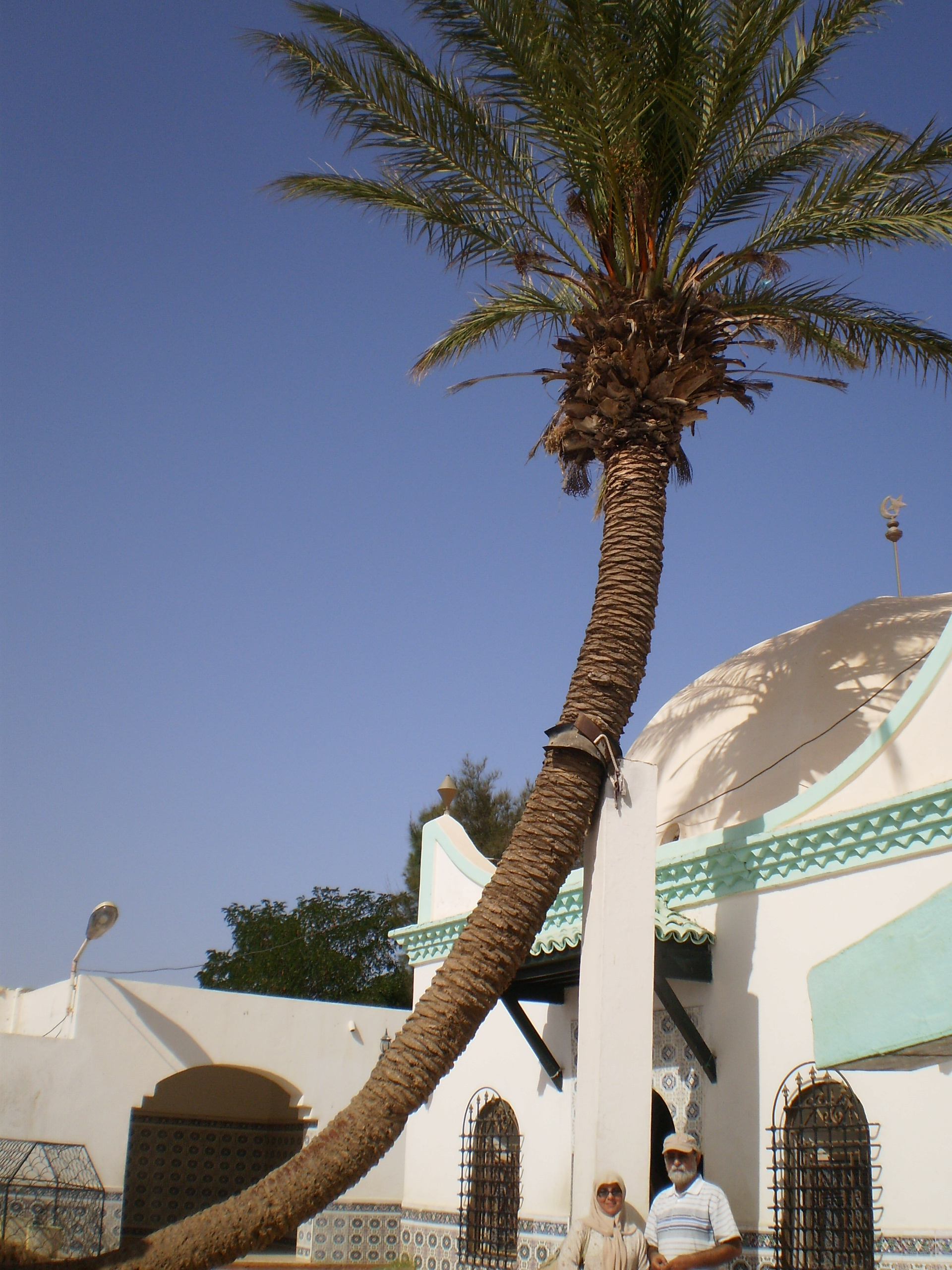 Saint Sidi Lakhdar du côté de Mostaganem. Poésie et croyances.